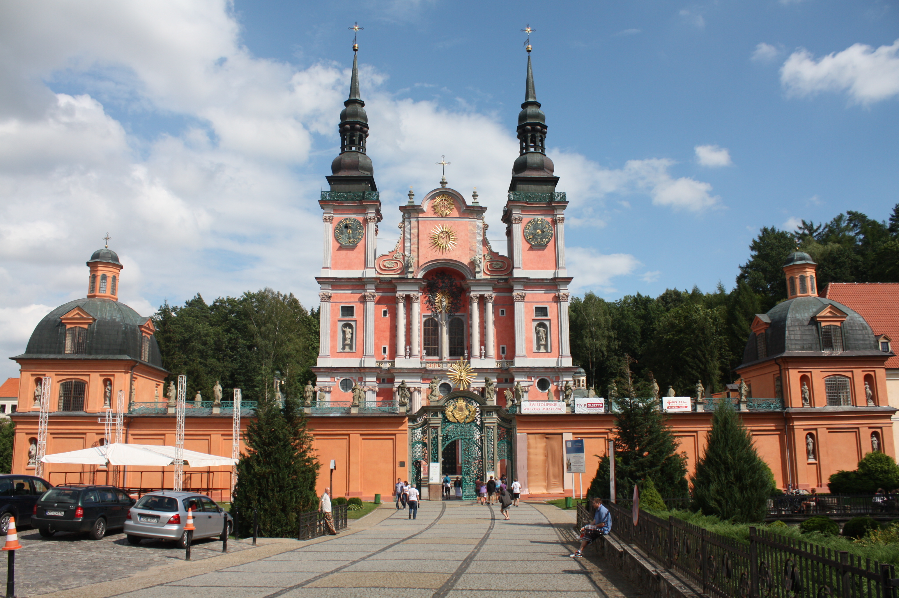 Święta Lipka - Bazylika Nawiedzenia Najświętszej Maryi Panny z wyposażeniem wnętrza, krużgankami i klasztorem This photo of Warmian-Masurian Voivodeship was taken during Wikiexpedition 2012 set up by Wikimedia Polska Association. You can see all photographs in category Wikiekspedycja 2012. The making of this document was supported by Wikimedia Polska.